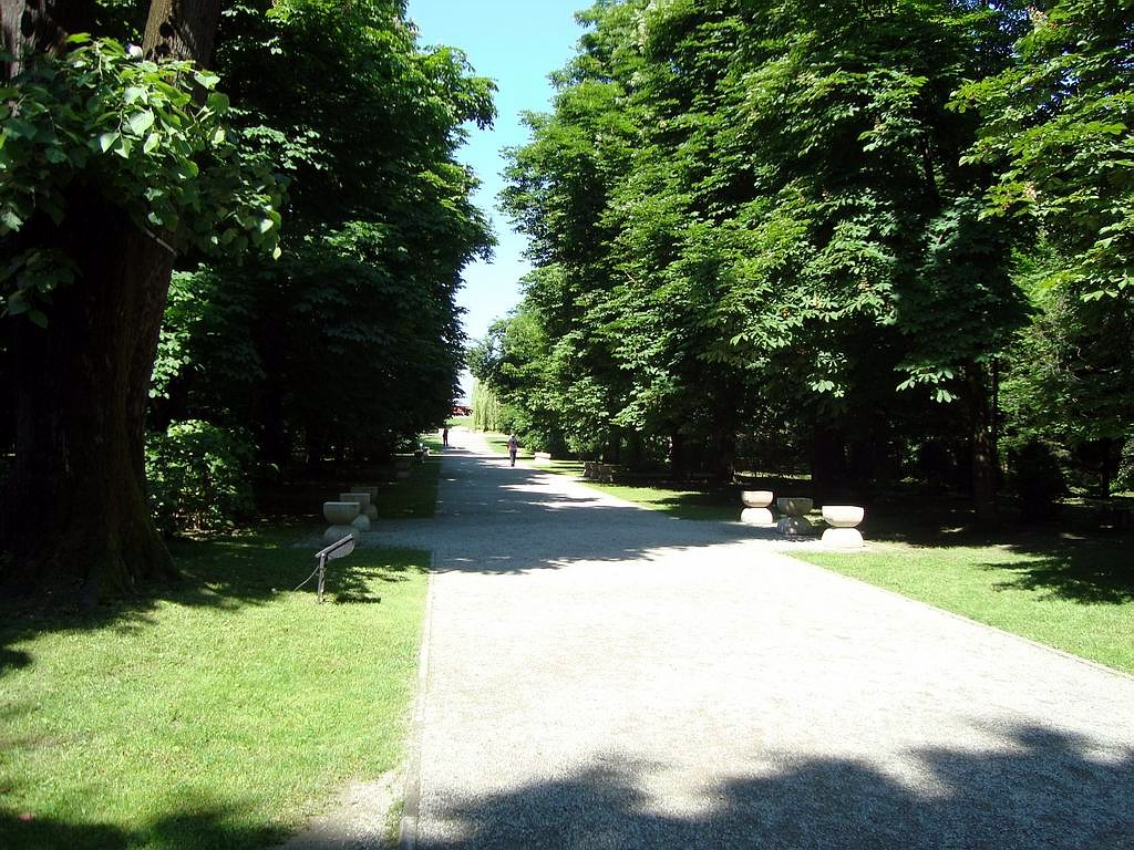 30 scaune pătrate din municipiul Târgu Jiu, Bd. Brâncuşi Constantin, Grădina Publică, construite de Constantin Brâncuşi în anii 1937-1938 05